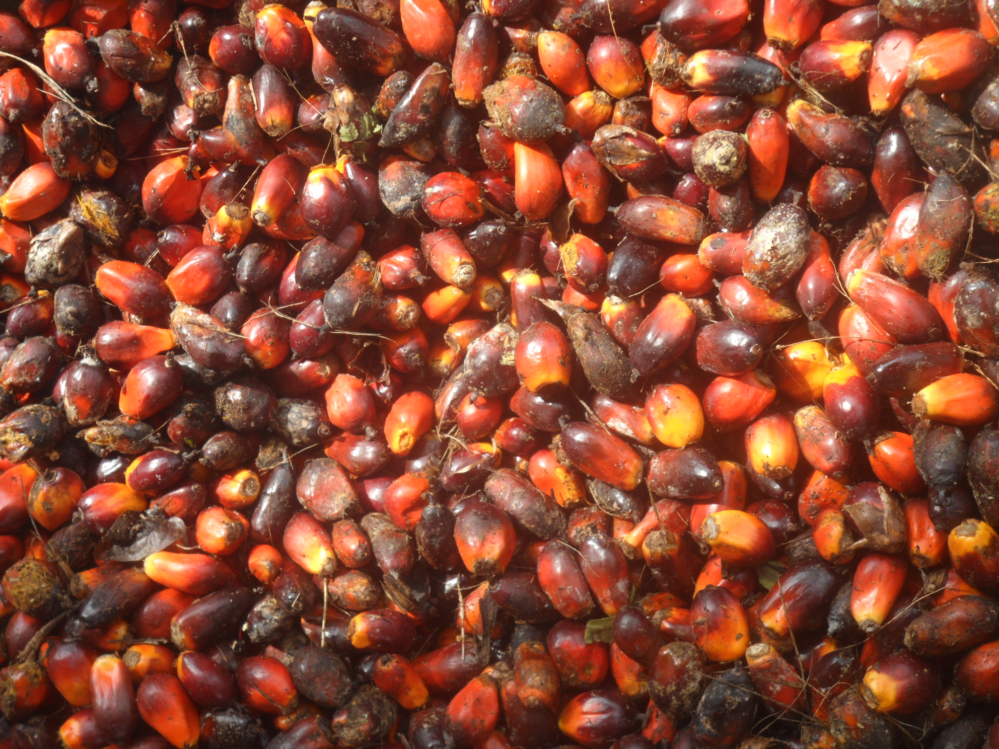 Noix de palme (Elaeis guineensis) à Tayap (Cameroun).